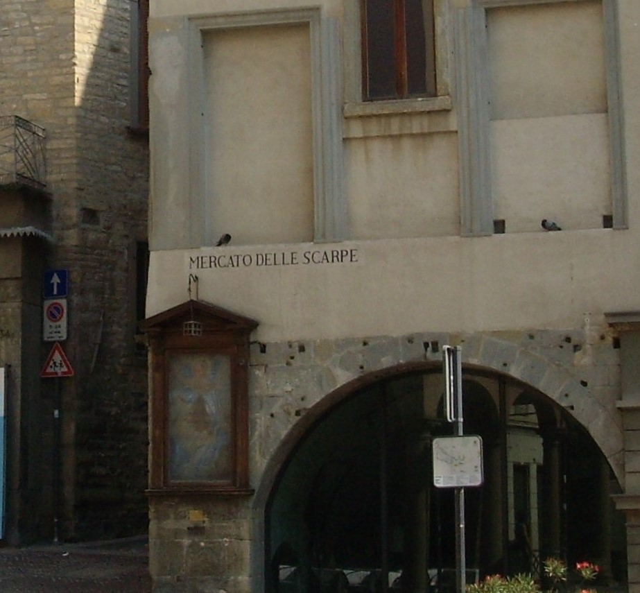 Particolare di una foto caricata della piazza Mercato delle scarpe in Bergamo